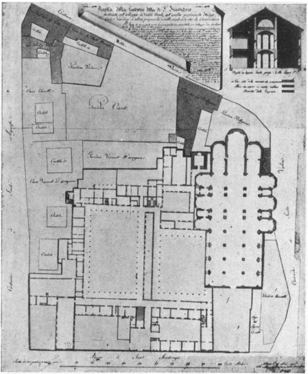 Plan de l'église et son implantation dans le pâté de bâtiments (début du XIXe siècle)